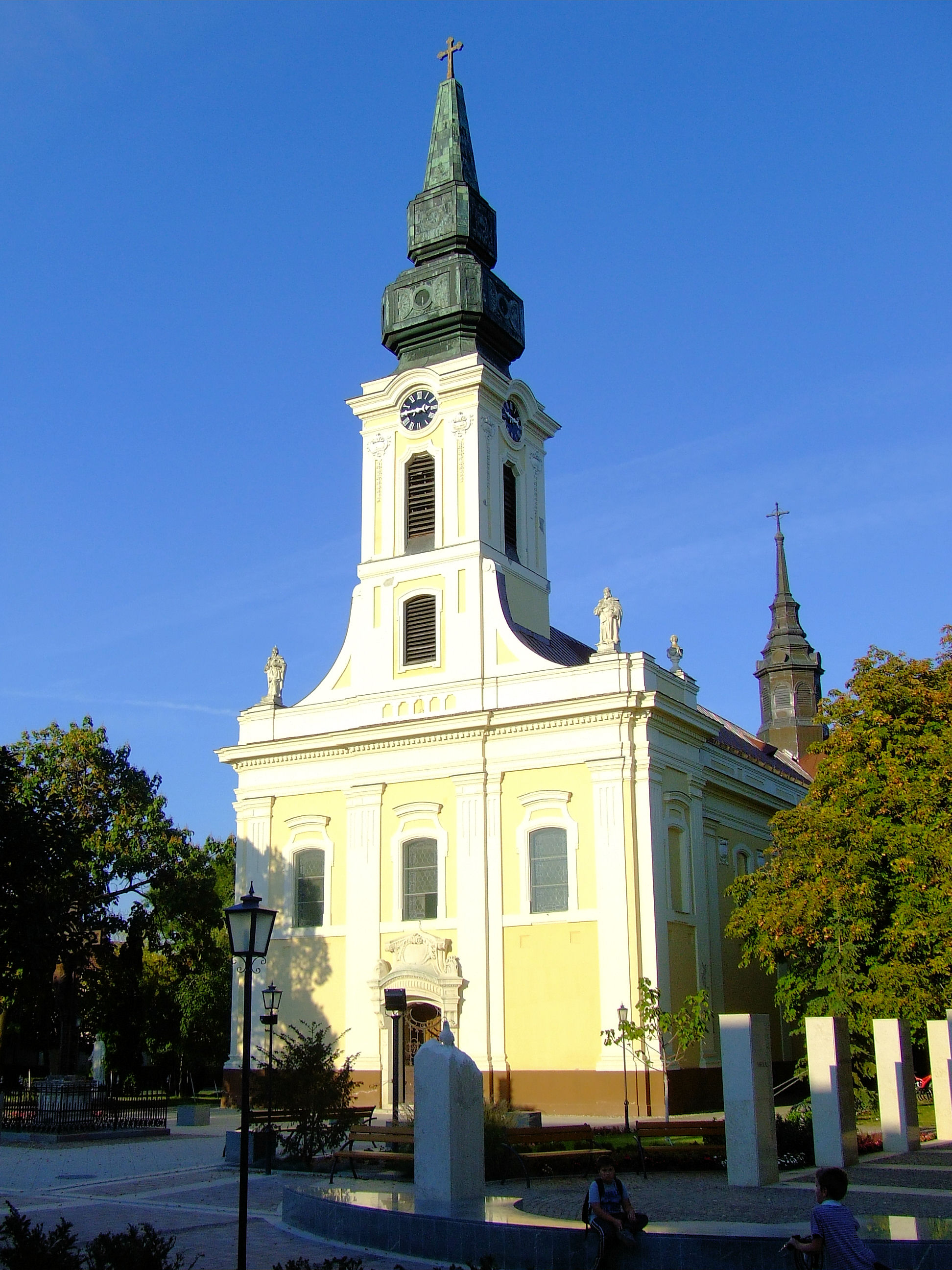 A jánoshalmi Szent Anna-templom. Épült 1783 és 1787 között. 1907 és 1909 Foerk Ernő tervei szerint bűvítették